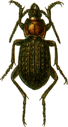 This file has been extracted from another file: Jacobs02.jpg